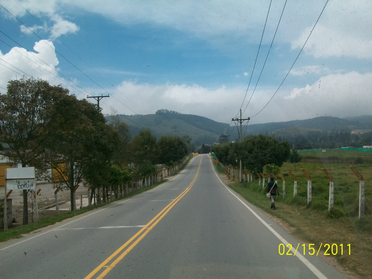 FONDO RIO BOGOTA SOACHA